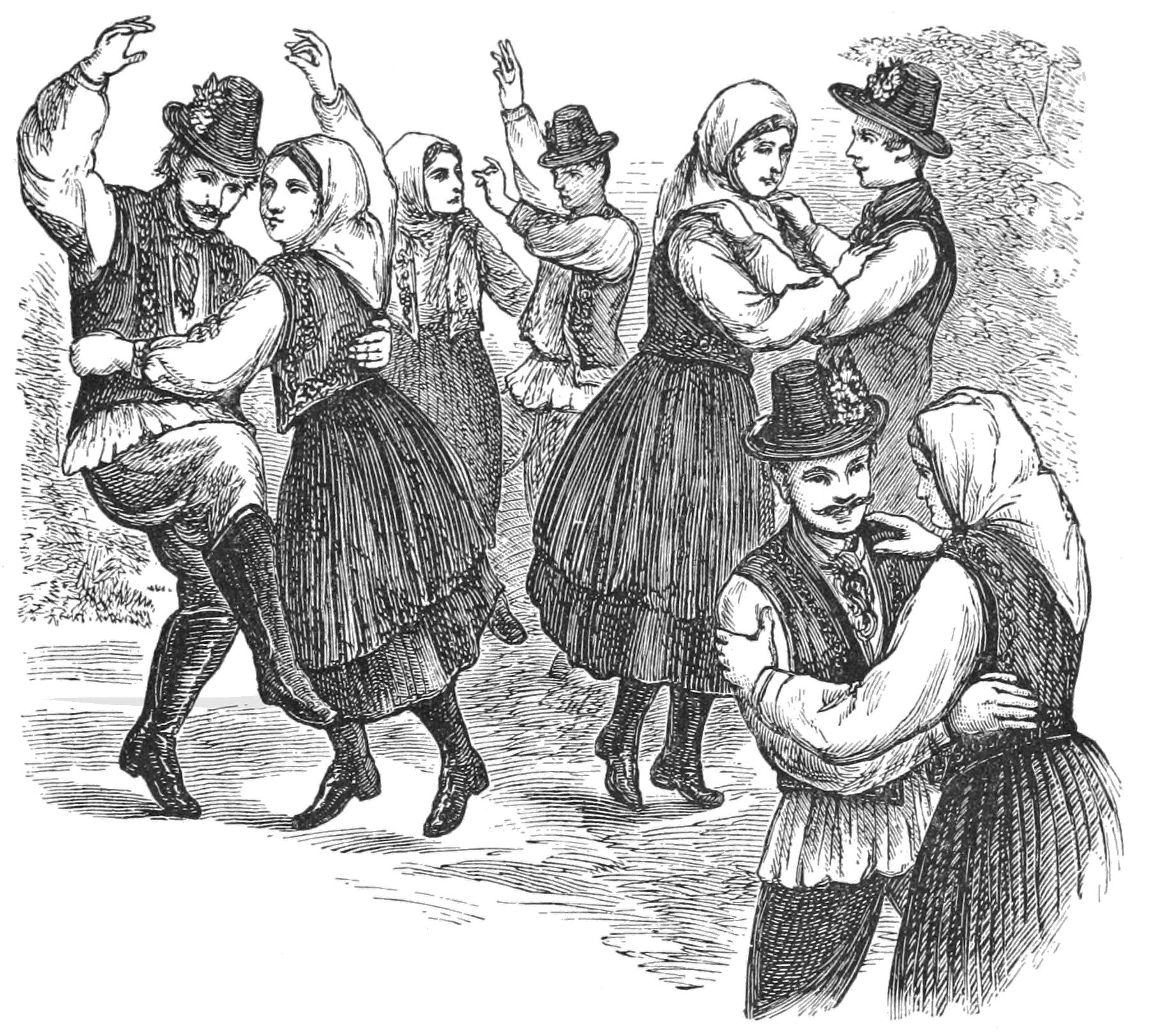 Csárdás - Hungarian folk dance